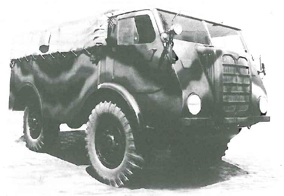 Kołowy ciągnik artyleryjski 4x4 PZInż. 342 [opis oryginalny]